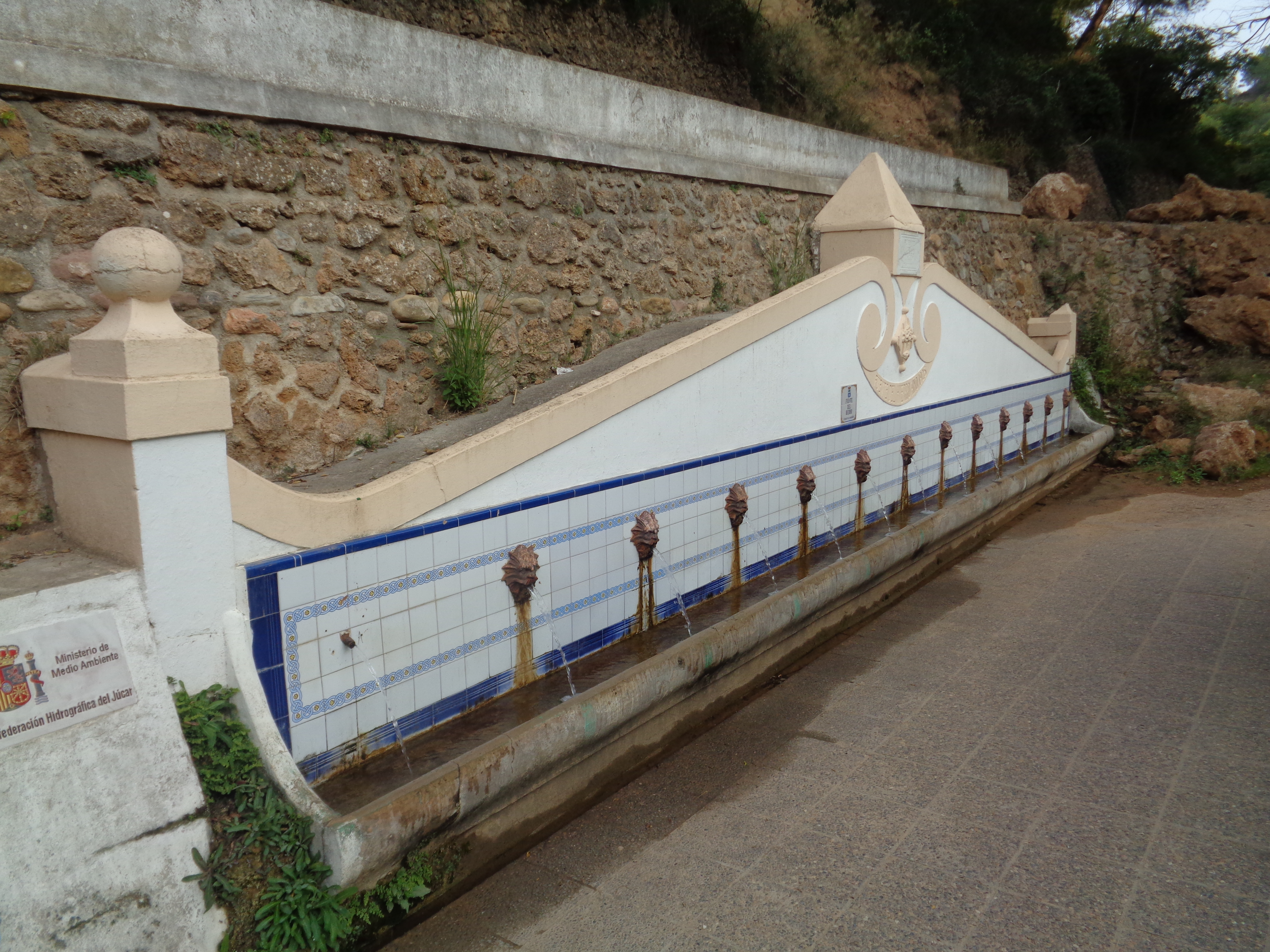 Font del Ferro